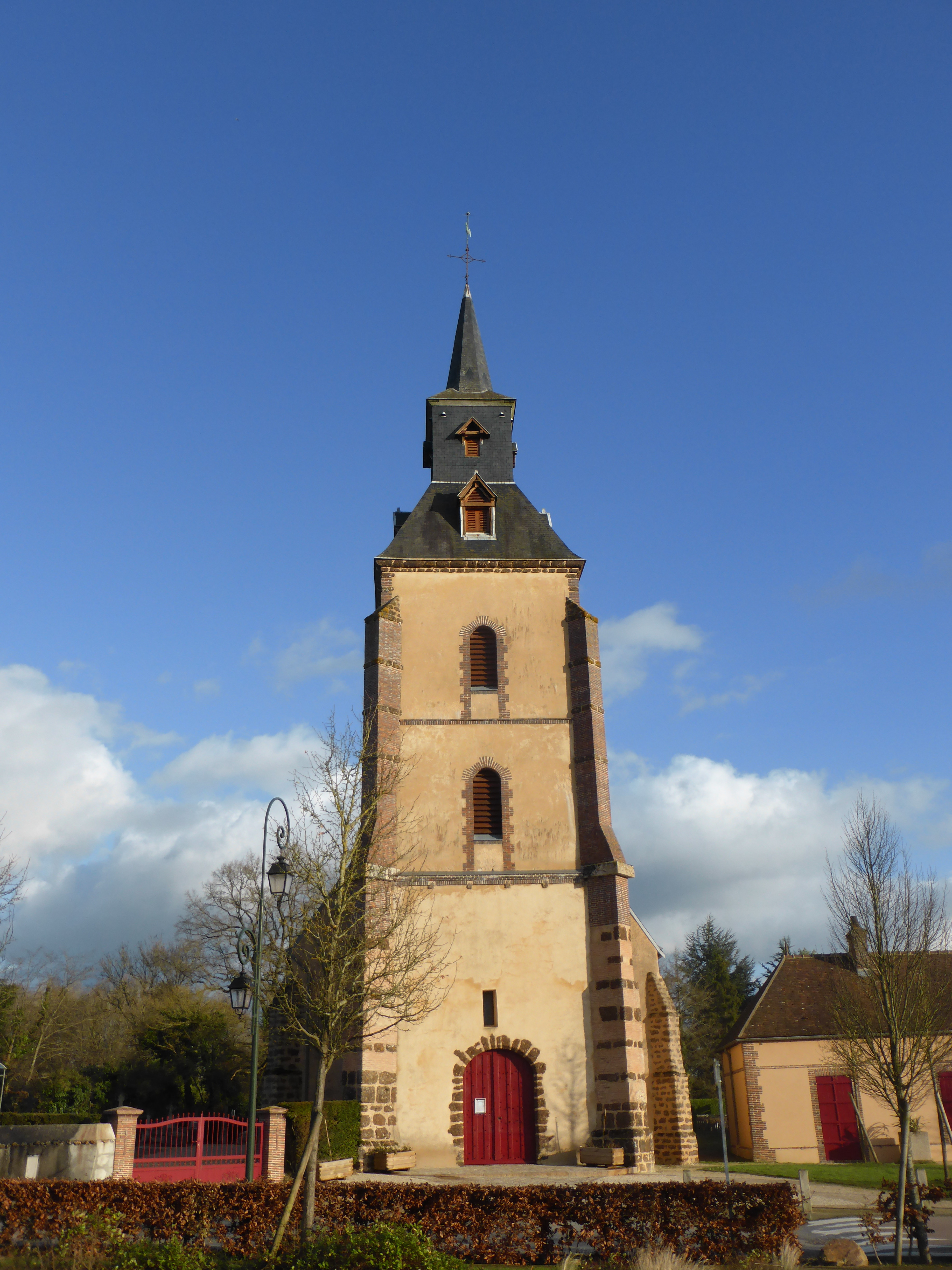 Façade de l'église Saint-Jean de Belhomert, en Eure-et-Loir.